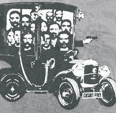 Desenho do Bando Bonnot - Flavio Costantini